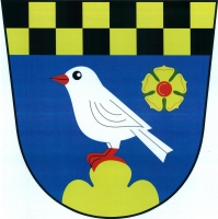 Břežany (ZN), znak. V modrém štítě pod černo-zlatě dvěma řadami šachovanou hlavou na zlatém trojvrší stříbrný pták s červenou zbrojí, provázený vlevo nahoře zlatou růží s červeným semeníkem a zelenými kališními lístky.